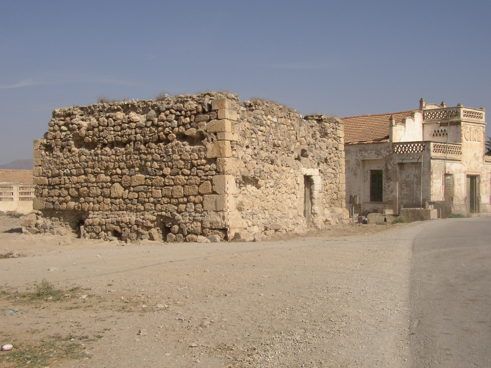 Vista general de una torre construida en el siglo xiv para proteger el campo de nogalte